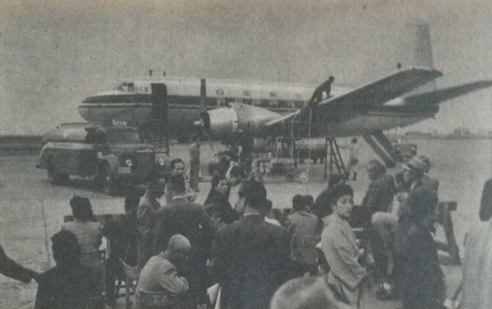 戦後初の日本国内民間航空定期便（1951年10月25日、羽田空港にて）